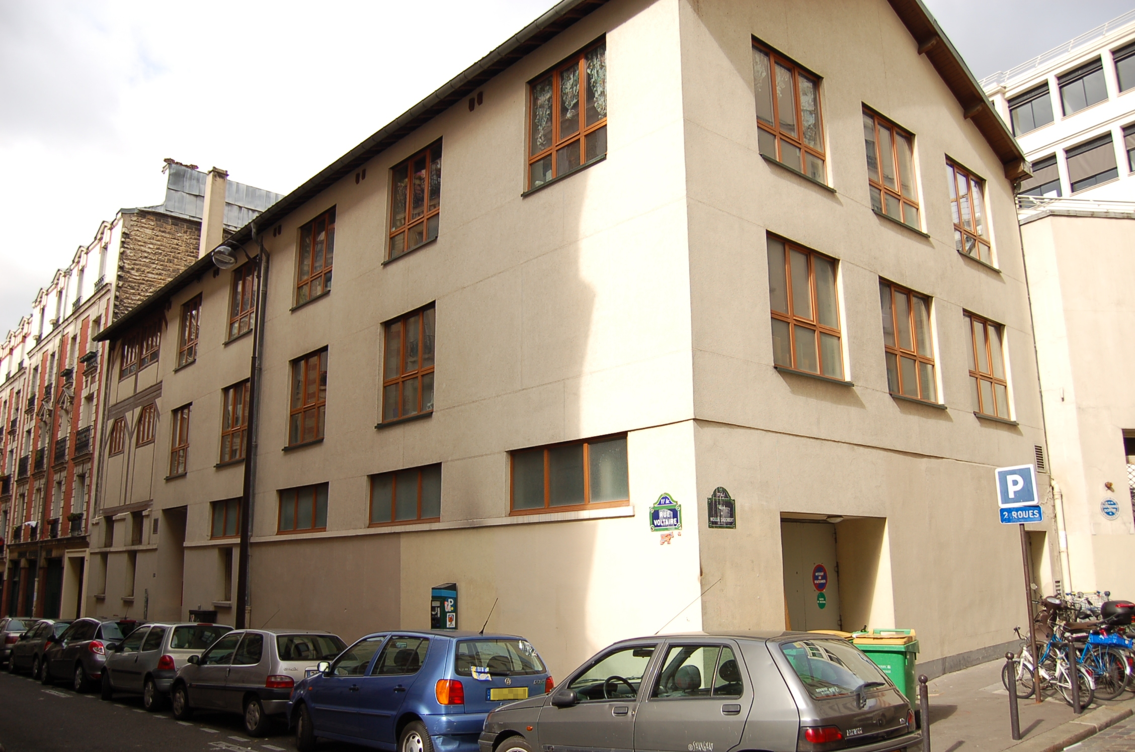 Centre international de culture populaire, 21 ter, rue Voltaire - 75011 Paris